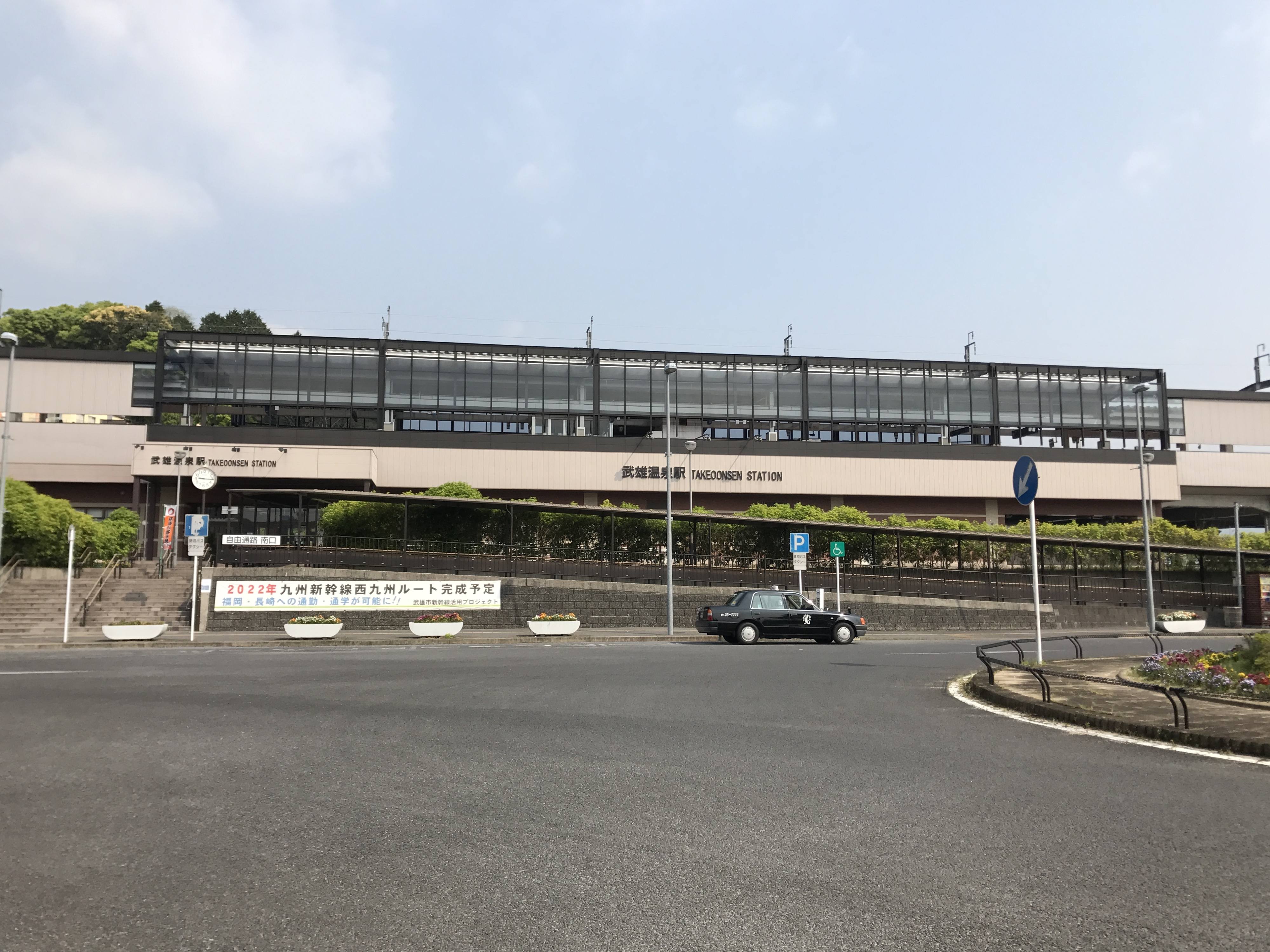 武雄温泉駅南口駅舎